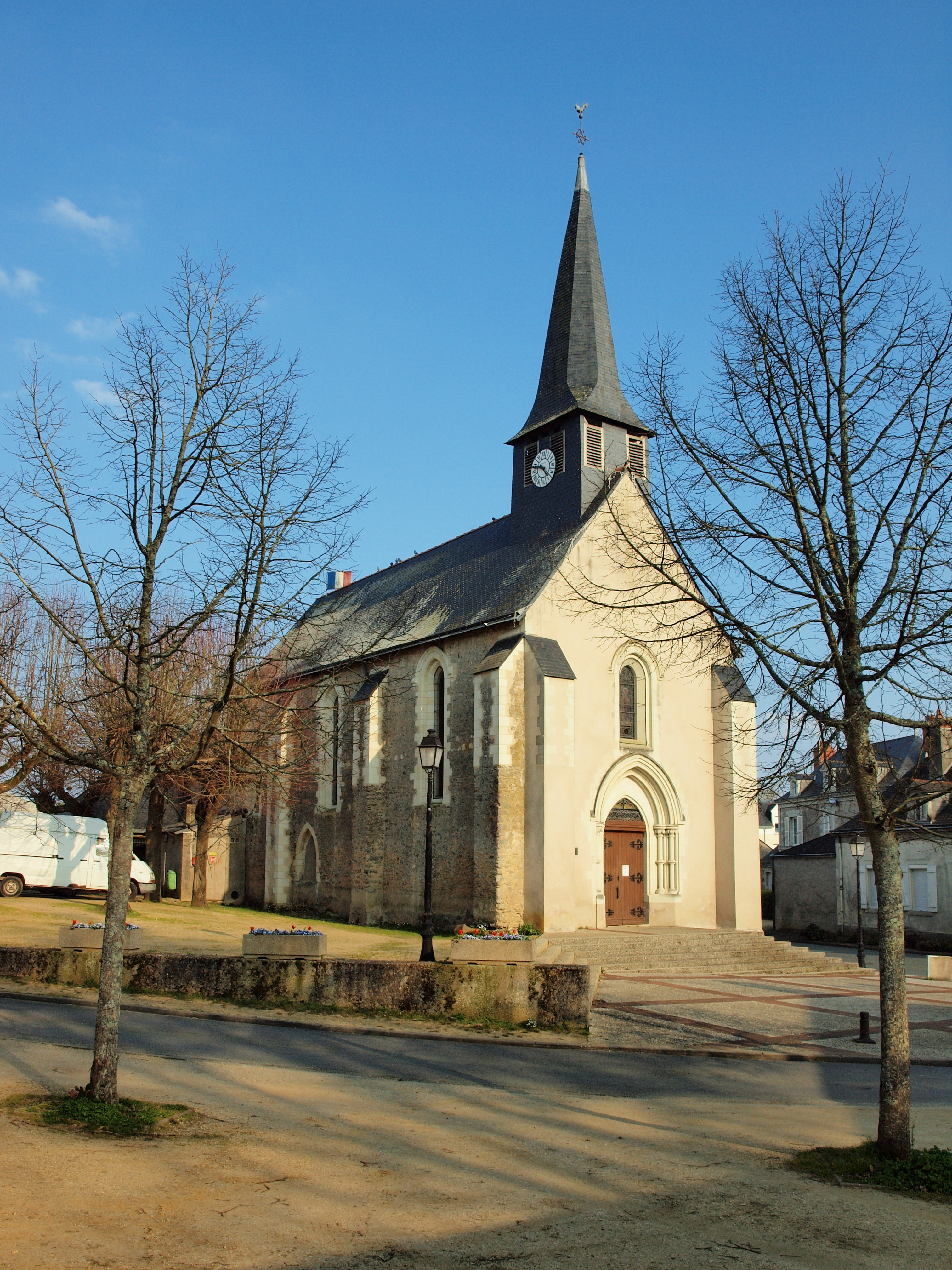 Pellouailles-les-Vignes (Maine-et-Loire, France)